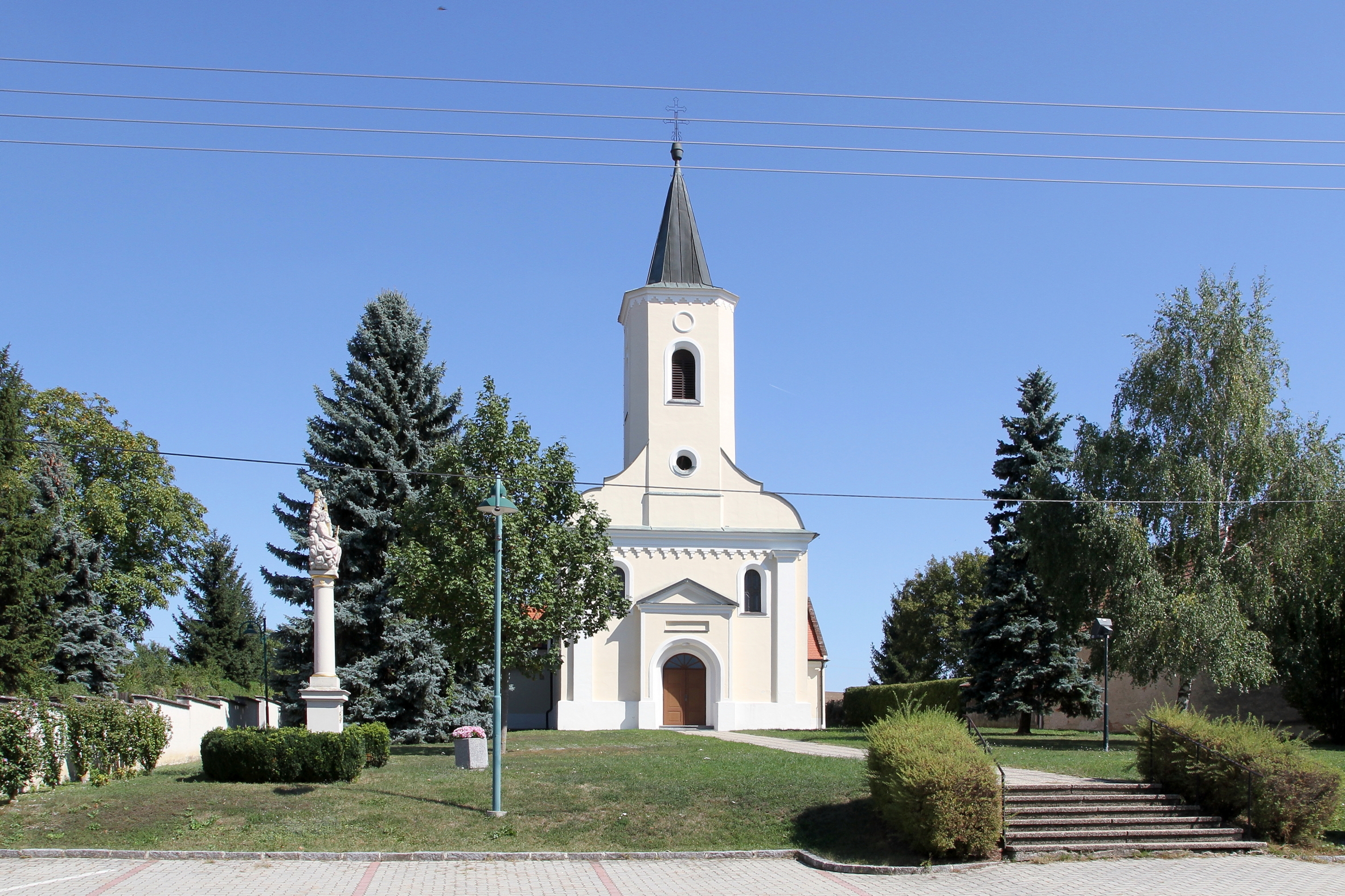 Katholische Pfarrkirche Allerheiligen in Nebersdorf, ein Ortsteil der burgenländischen Gemeinde Großwarasdorf. Ein einfacher Sakralbau mit westlichem Fassadenturm; anstelle einer Vorgängerkirche 1881 errichtet.